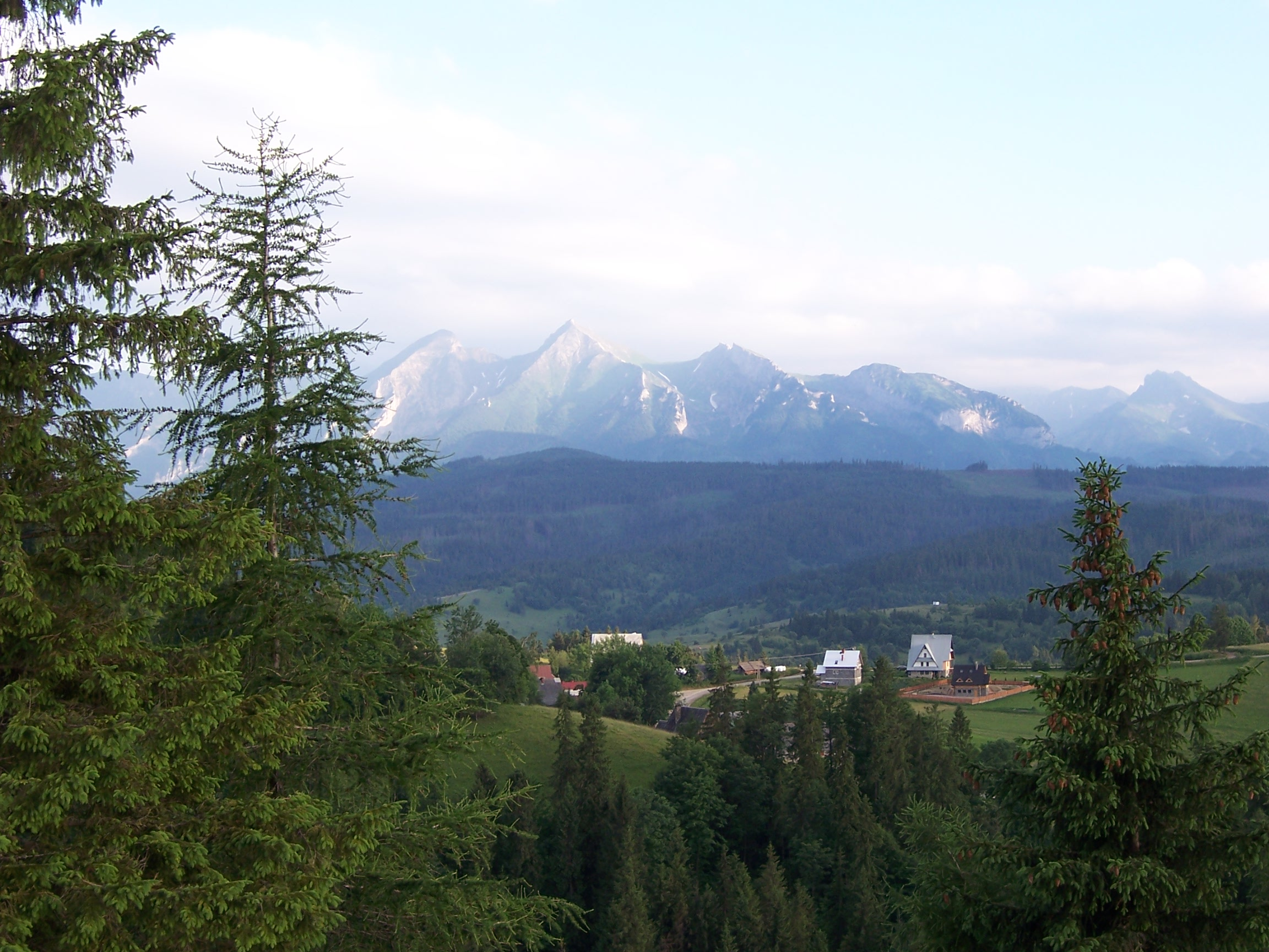 Widok znad Łapszanki